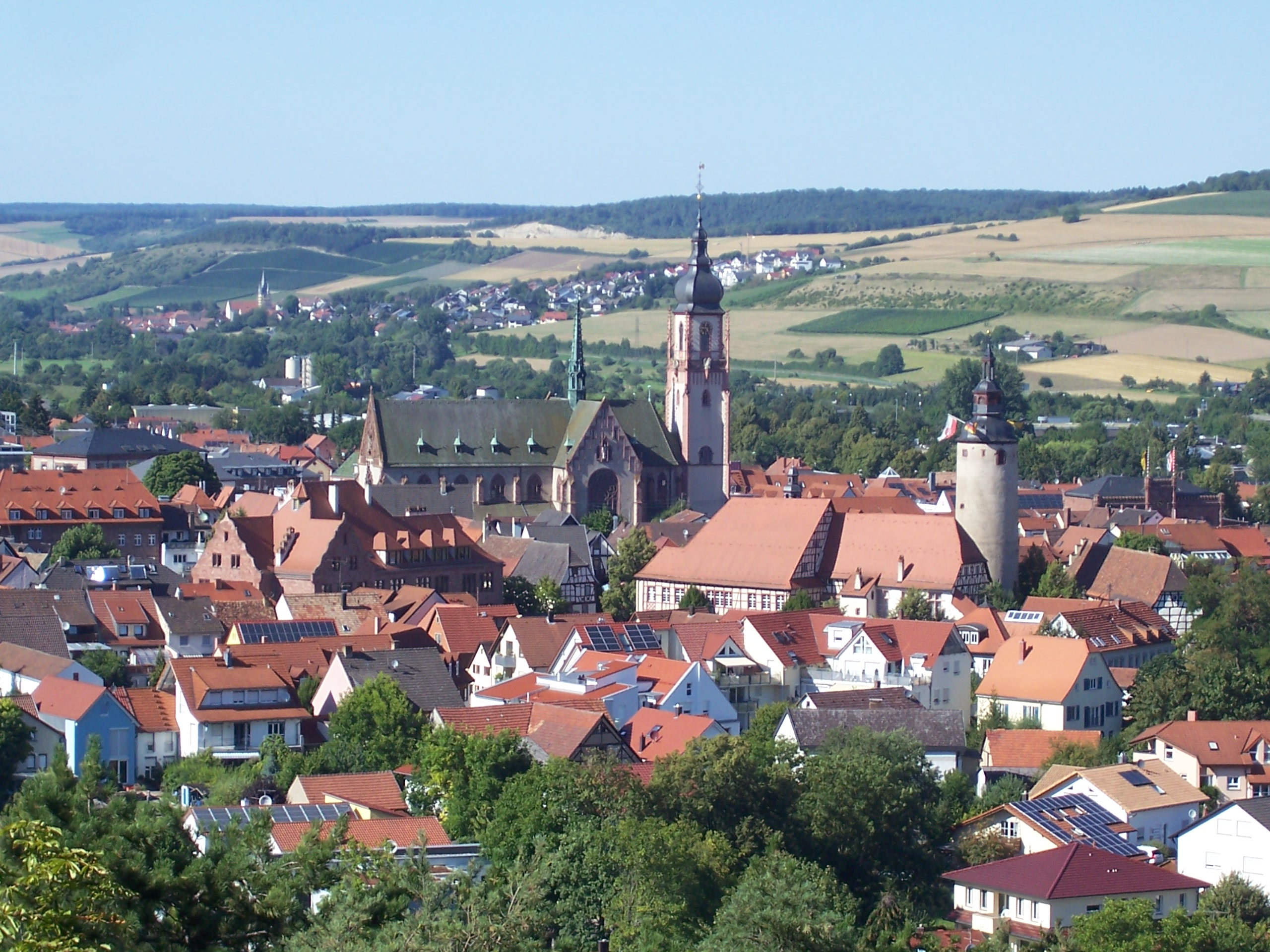 Altstadt von Tauberbischofsheim mit der Stadtkirche St. Martin und dem Kurmainzischen Schloß vom Höhberg (bei der Bismarksäule) aus